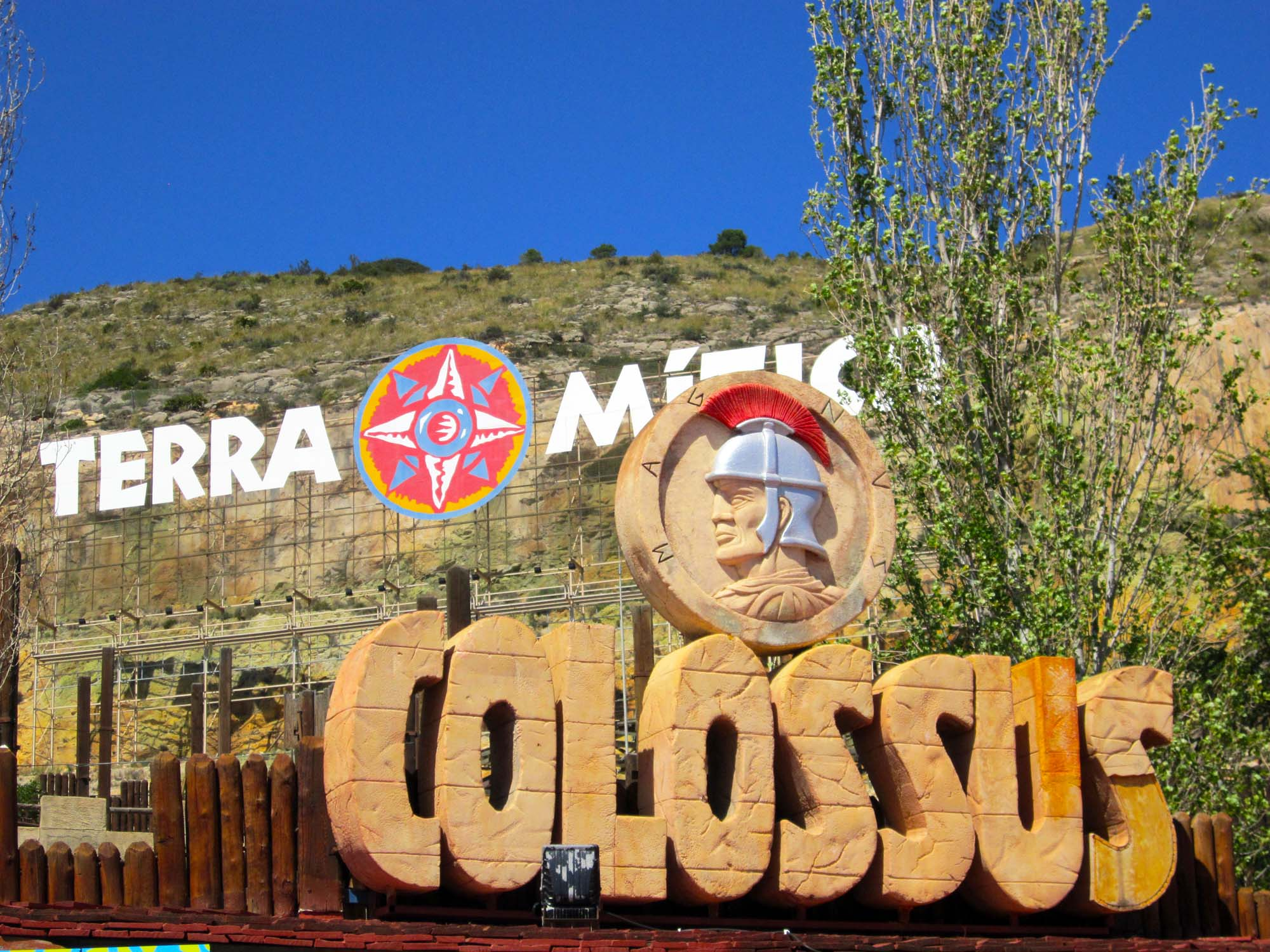 Logo de Magnus Colossus que preside la entrada ala coaster